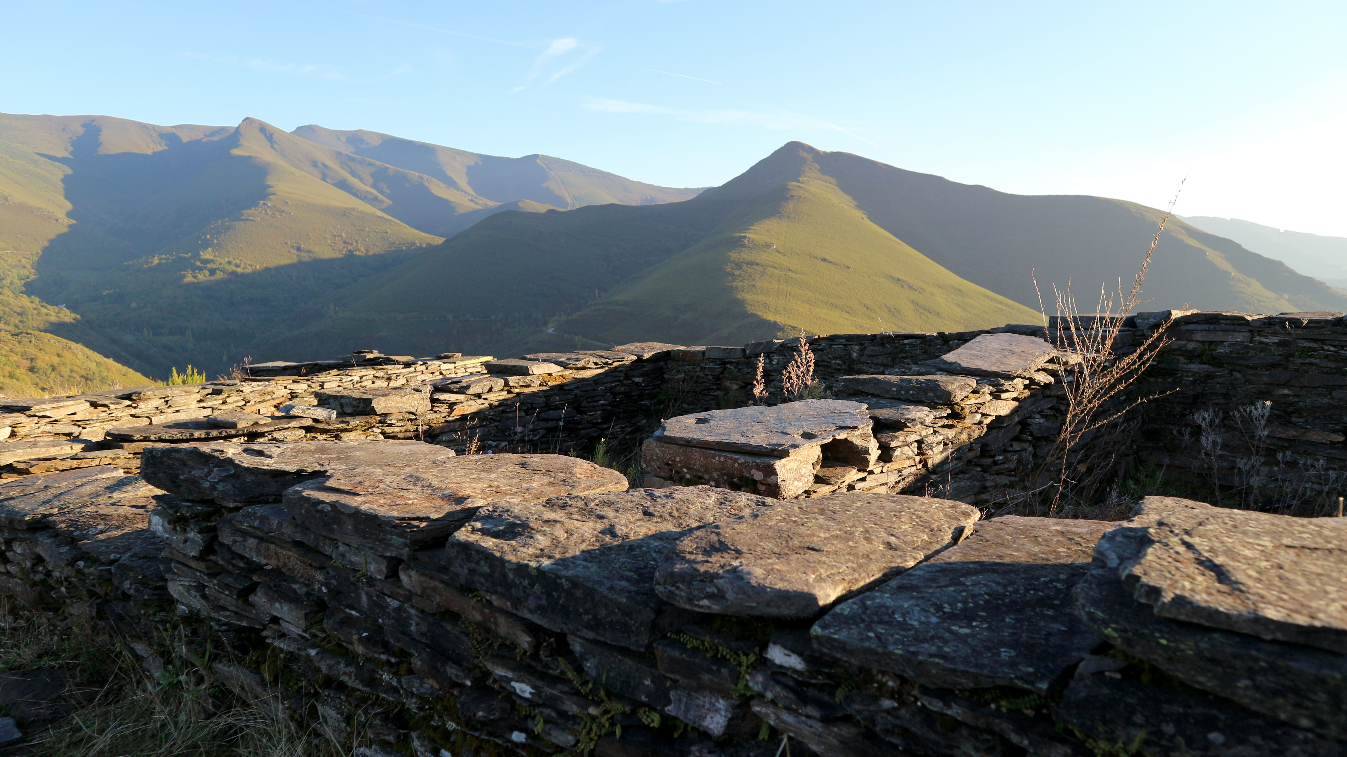 Castro da Torre de Sobredo, en Folgoso (Folgoso do Courel).